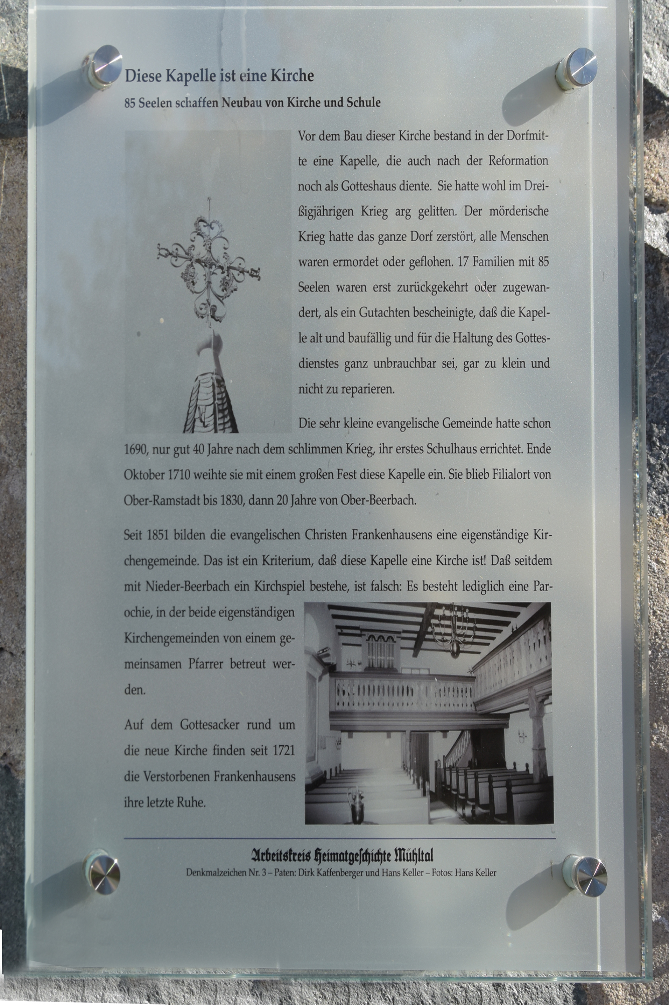 Tafel an der Kirchmauer mit Beschreibung der Geschichte des Gotteshauses, Mühltal-Frankenhausen, Römerweg 5a